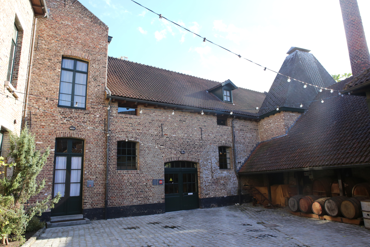 De binnenkoer van het Nationaal Jenevermuseum Hasselt, tijdens een bezoek op 26/10/2013.